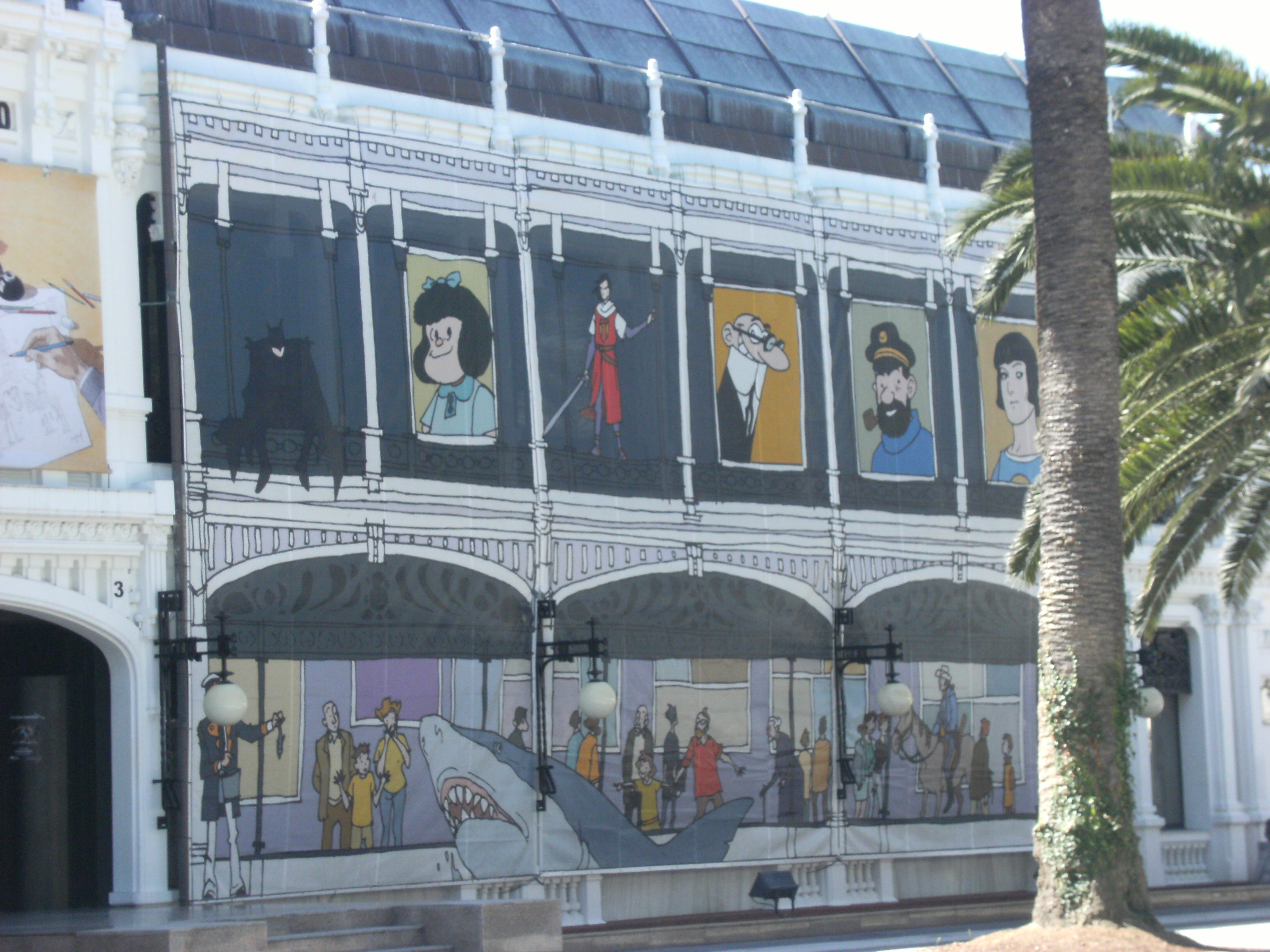 Foto de la fachada del Kiosko Alfonso que fue sede del Festival de la Historieta "Viñetas desde o Atlántico". Agosto de 2010.